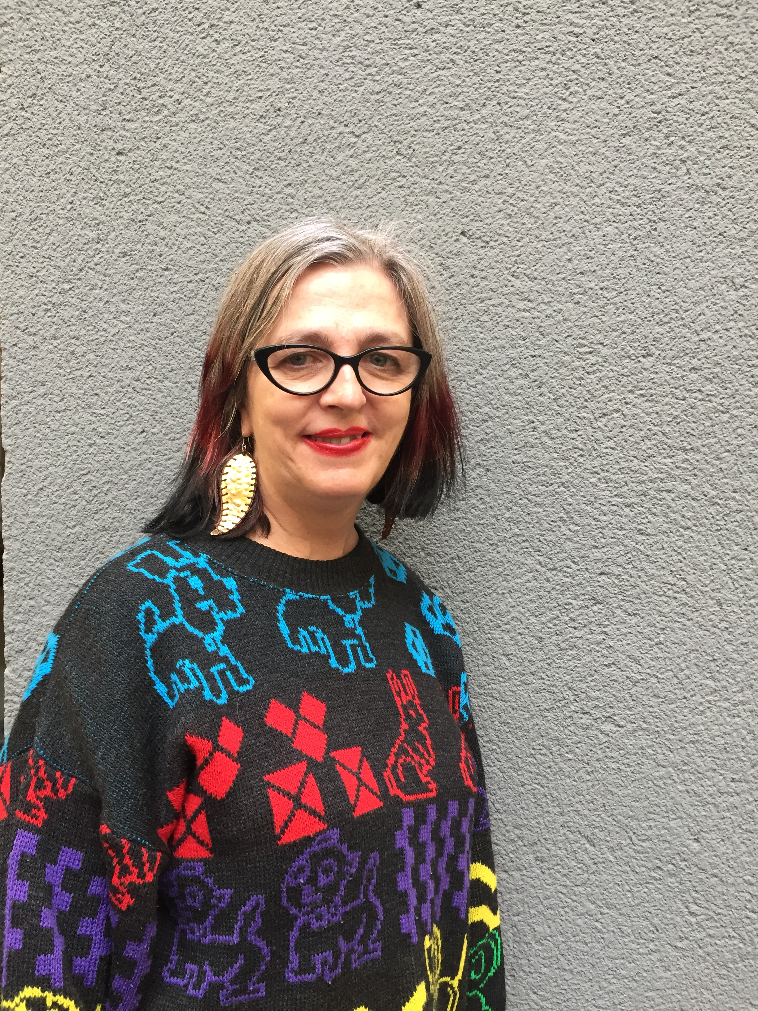 En la asamblea MAV